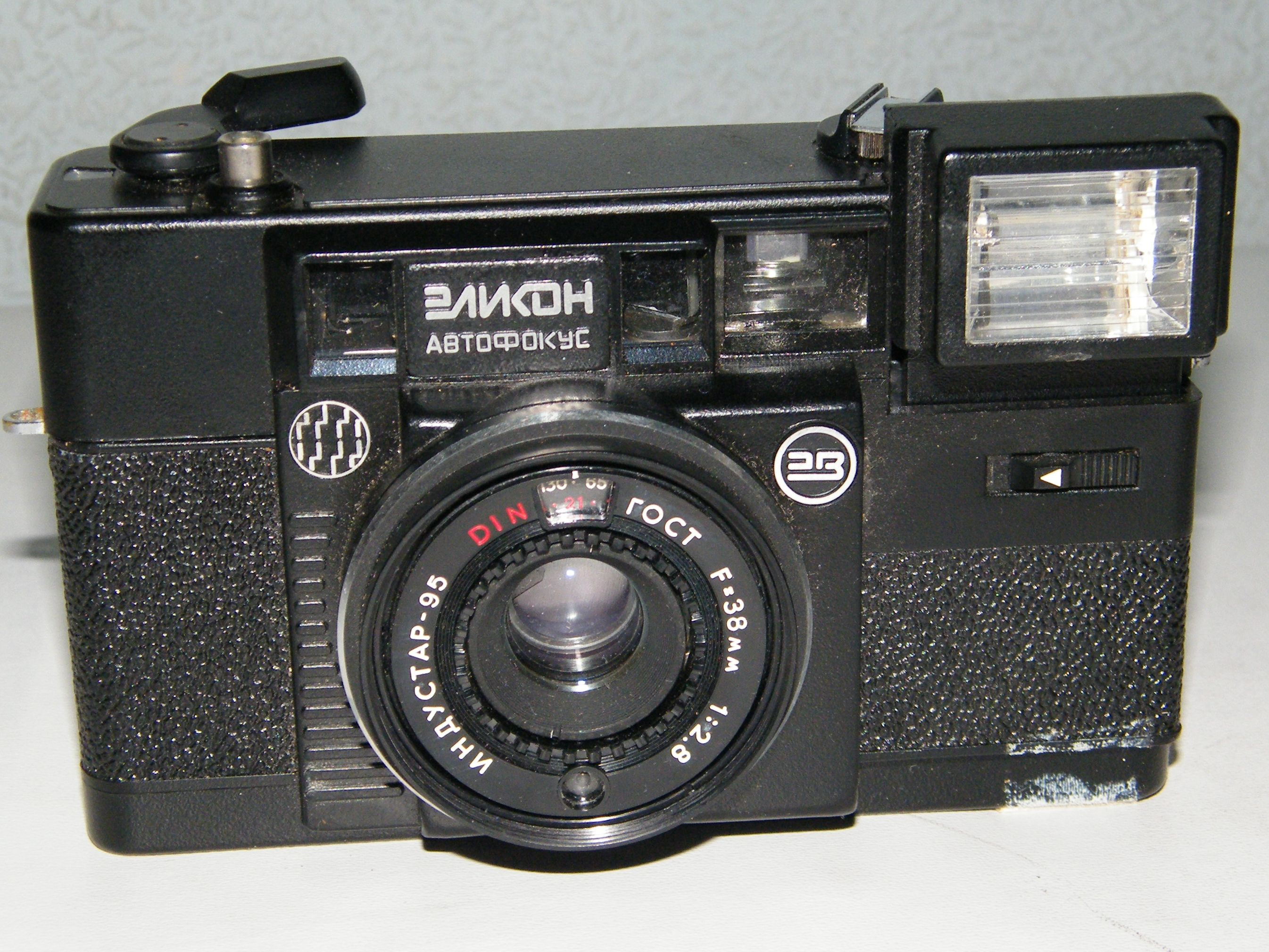 Фотоаппарат "Эликон-автофокус" - первый советский автоматический фотоаппарат с автофокусировкой. БелОМО, Минск, вторая половина 1980-х годов.